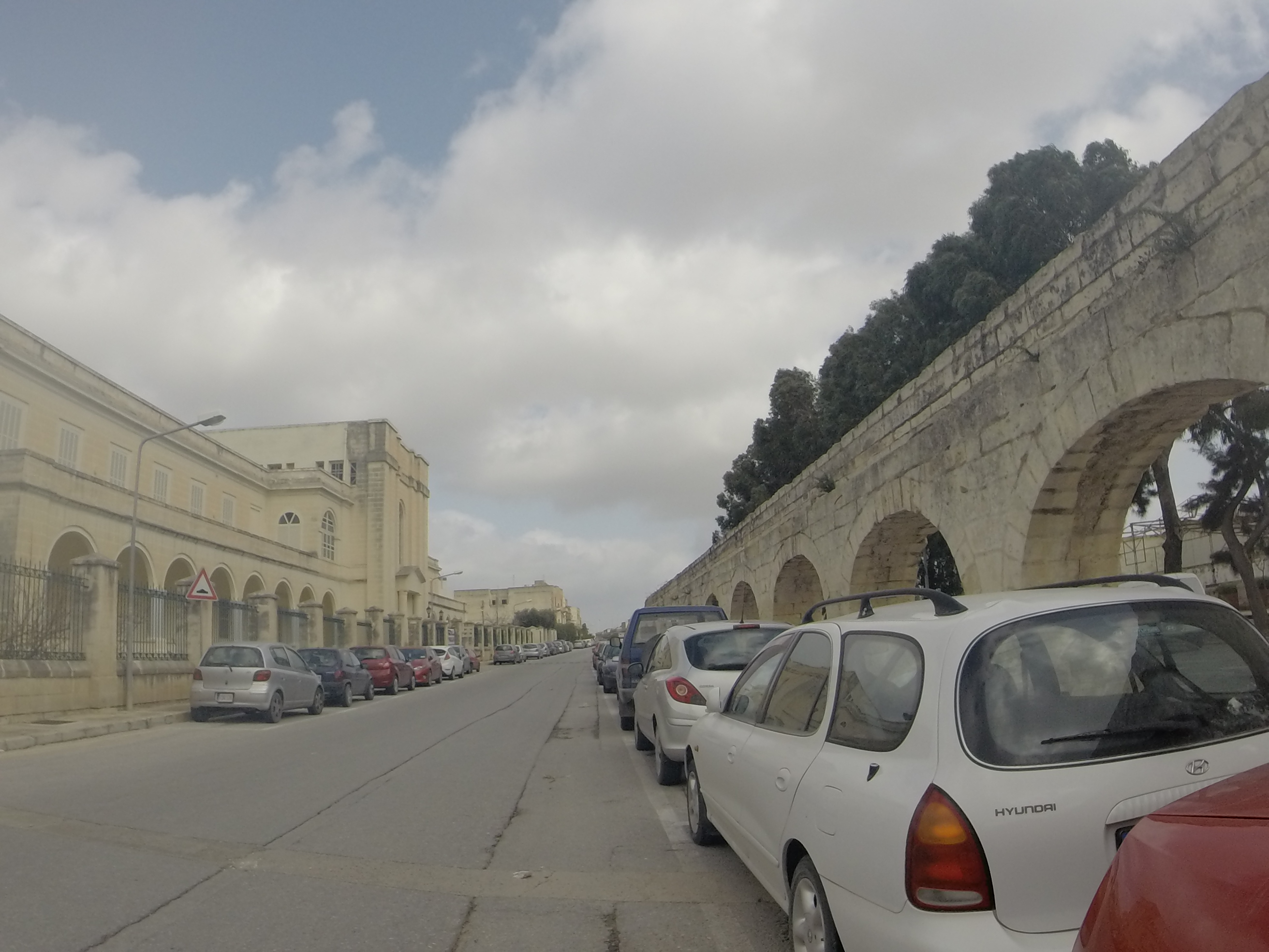 Triq Il-Kan. Indri Galea, Birkirkara, Malta